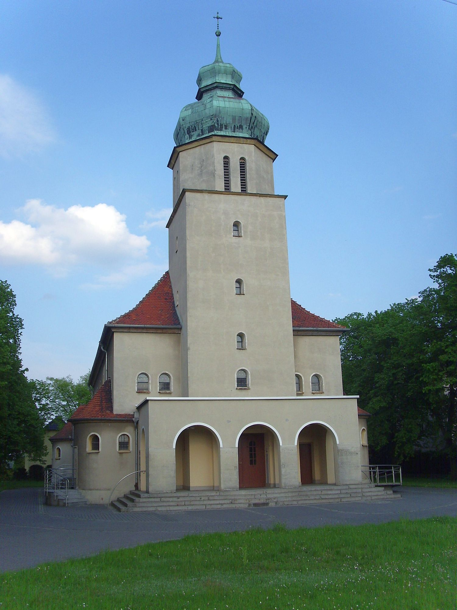 Sławice - kościół św. Jana Nepomucena, 1931